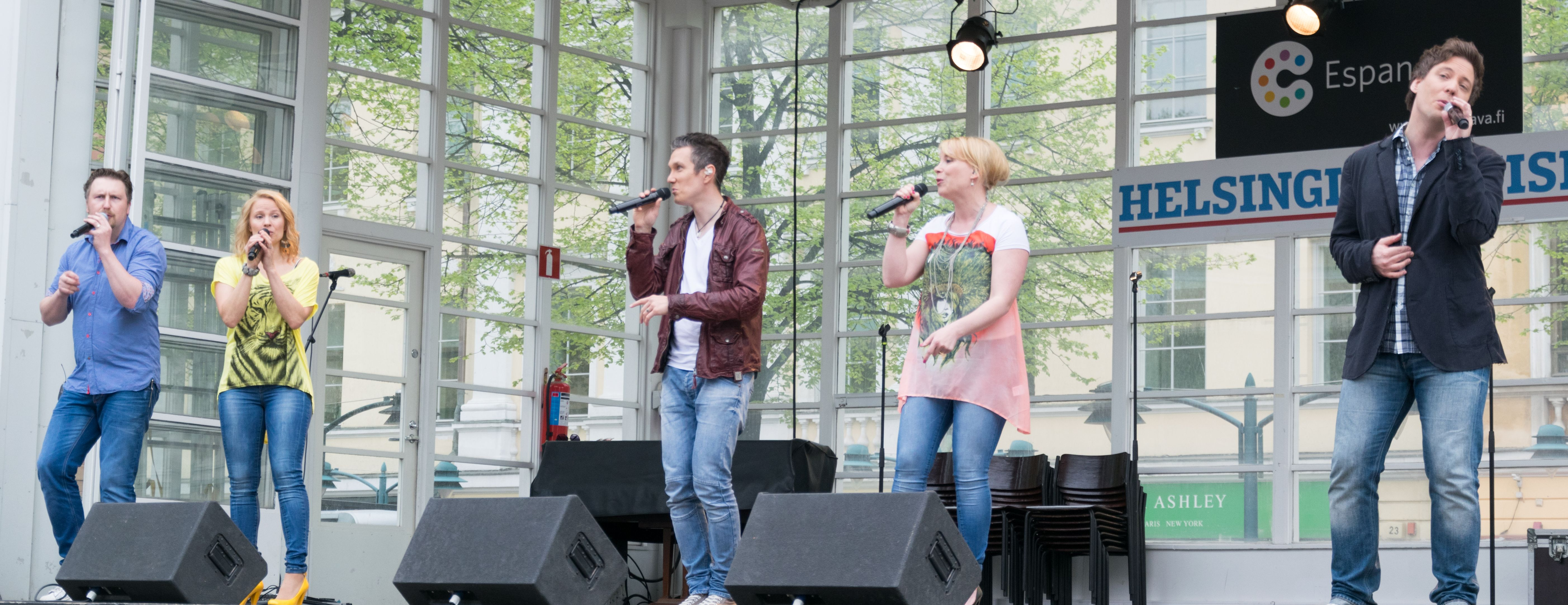 Club for Five, suomalainen lauluyhtye